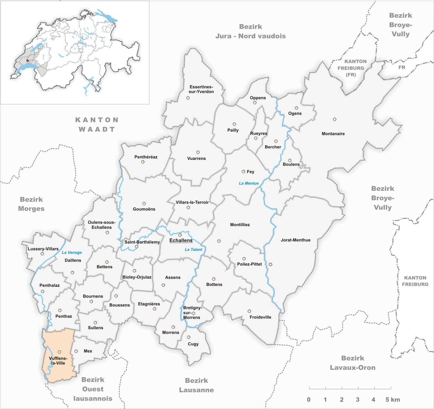 Municipality Vufflens-la-Ville